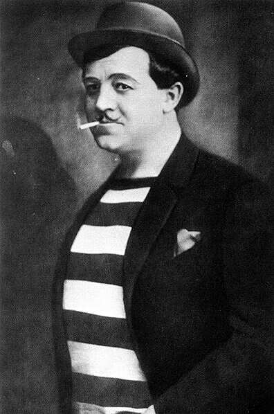 Csortos Gyula színművész, a Liliom című darabban